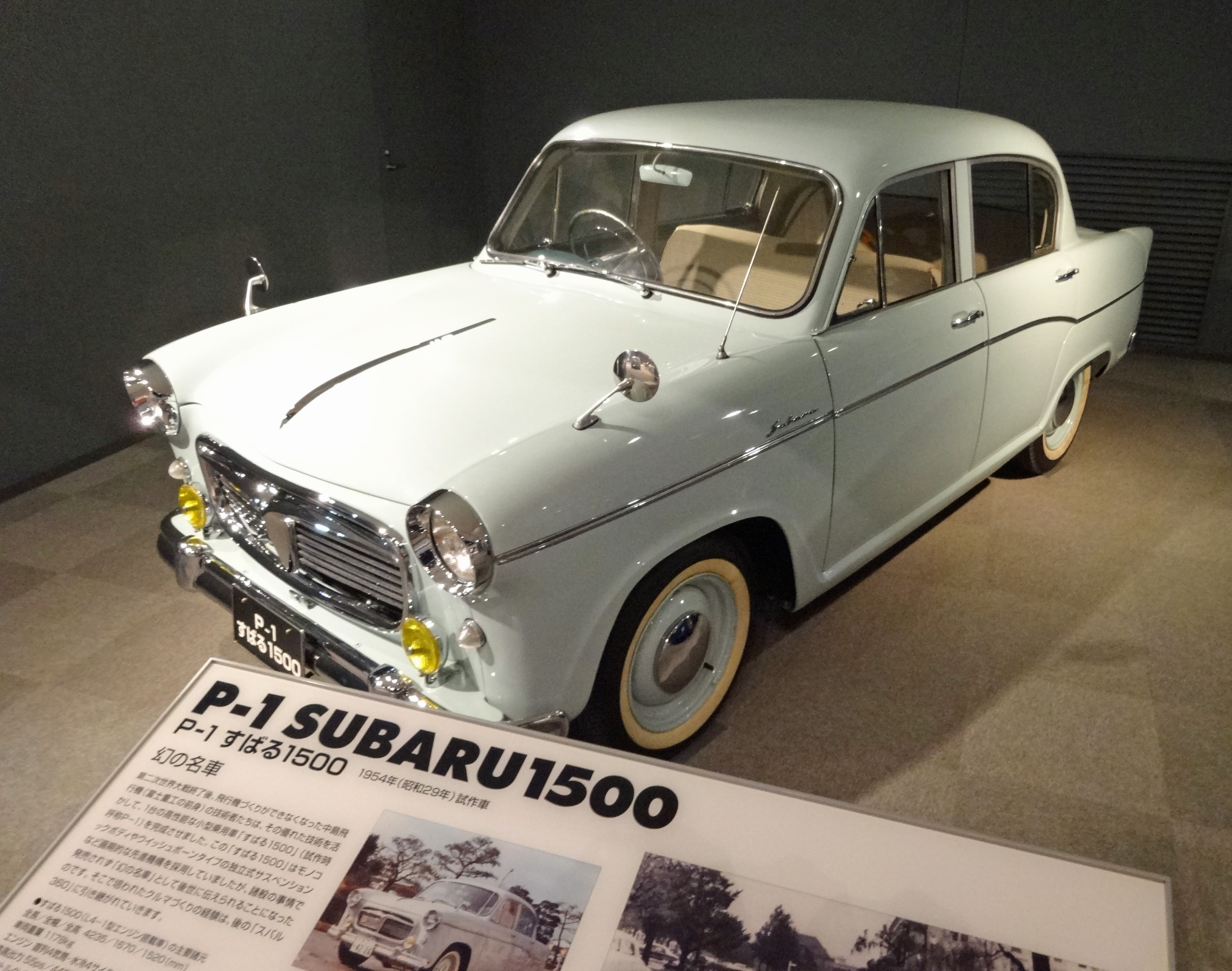 スバルビジターセンター内にあるスバル・1500